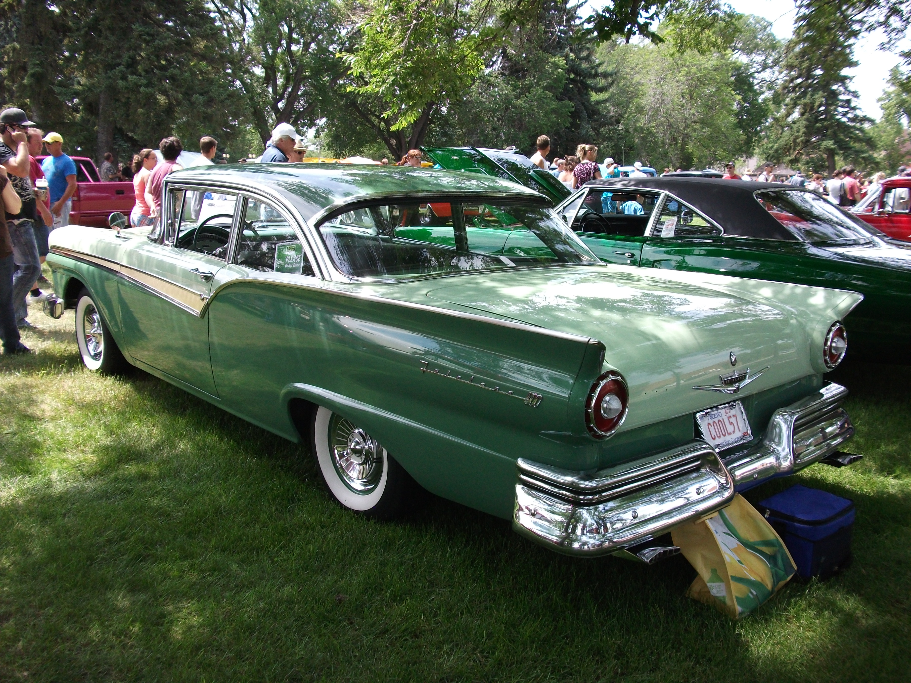 1957 Ford Fairlane 500